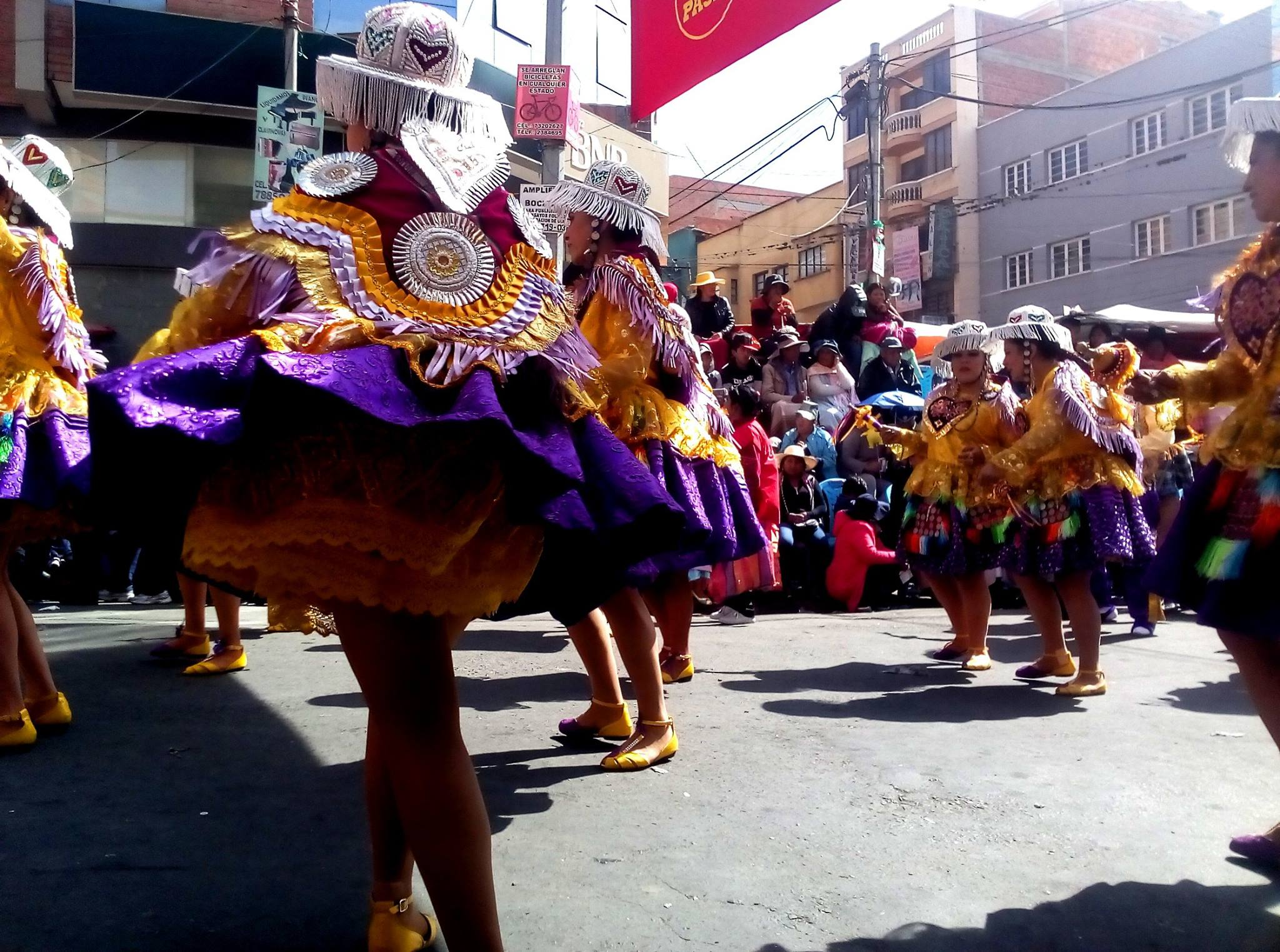 La Paz Bolivia 2017